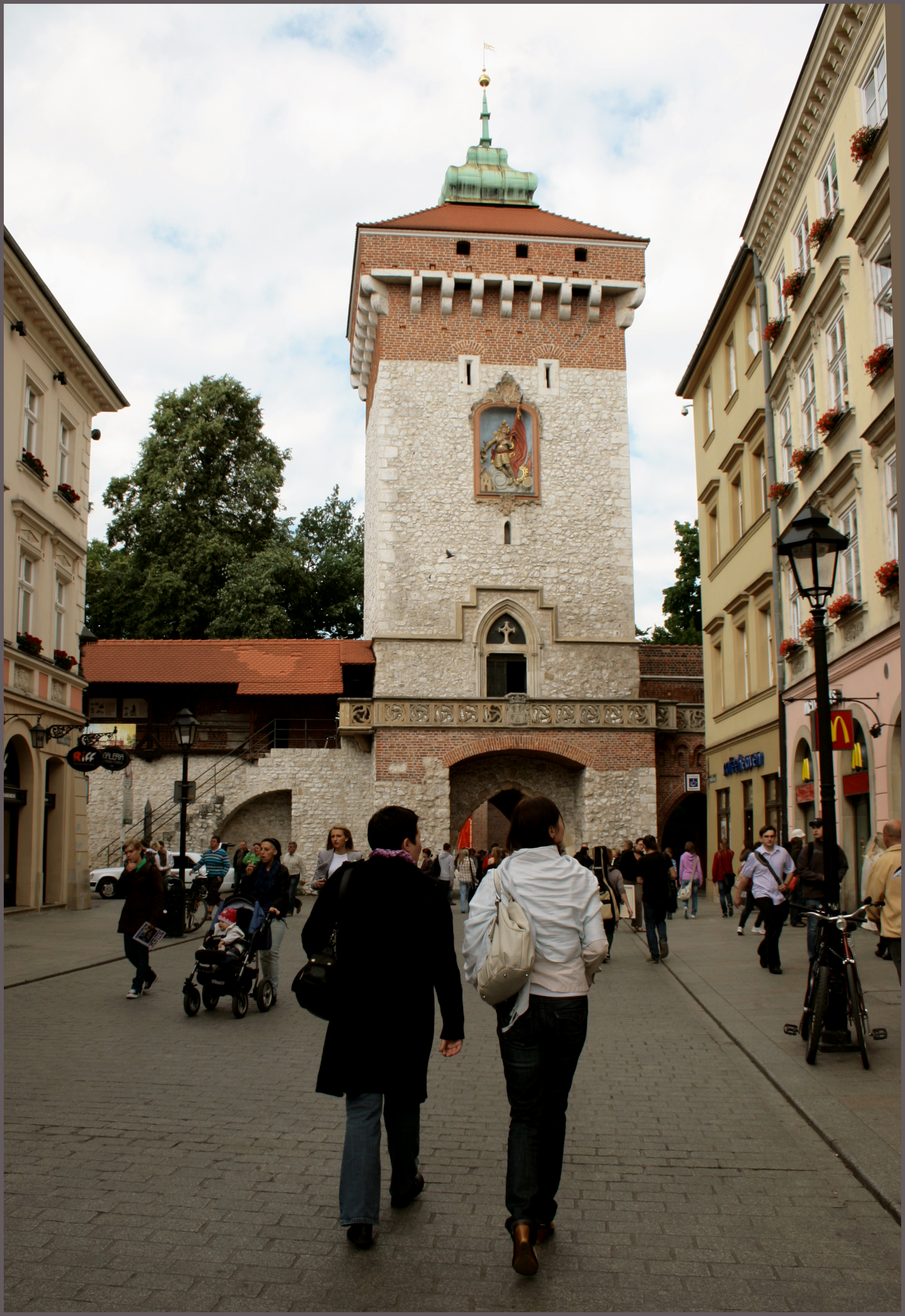 Brama Floriańska Krakow